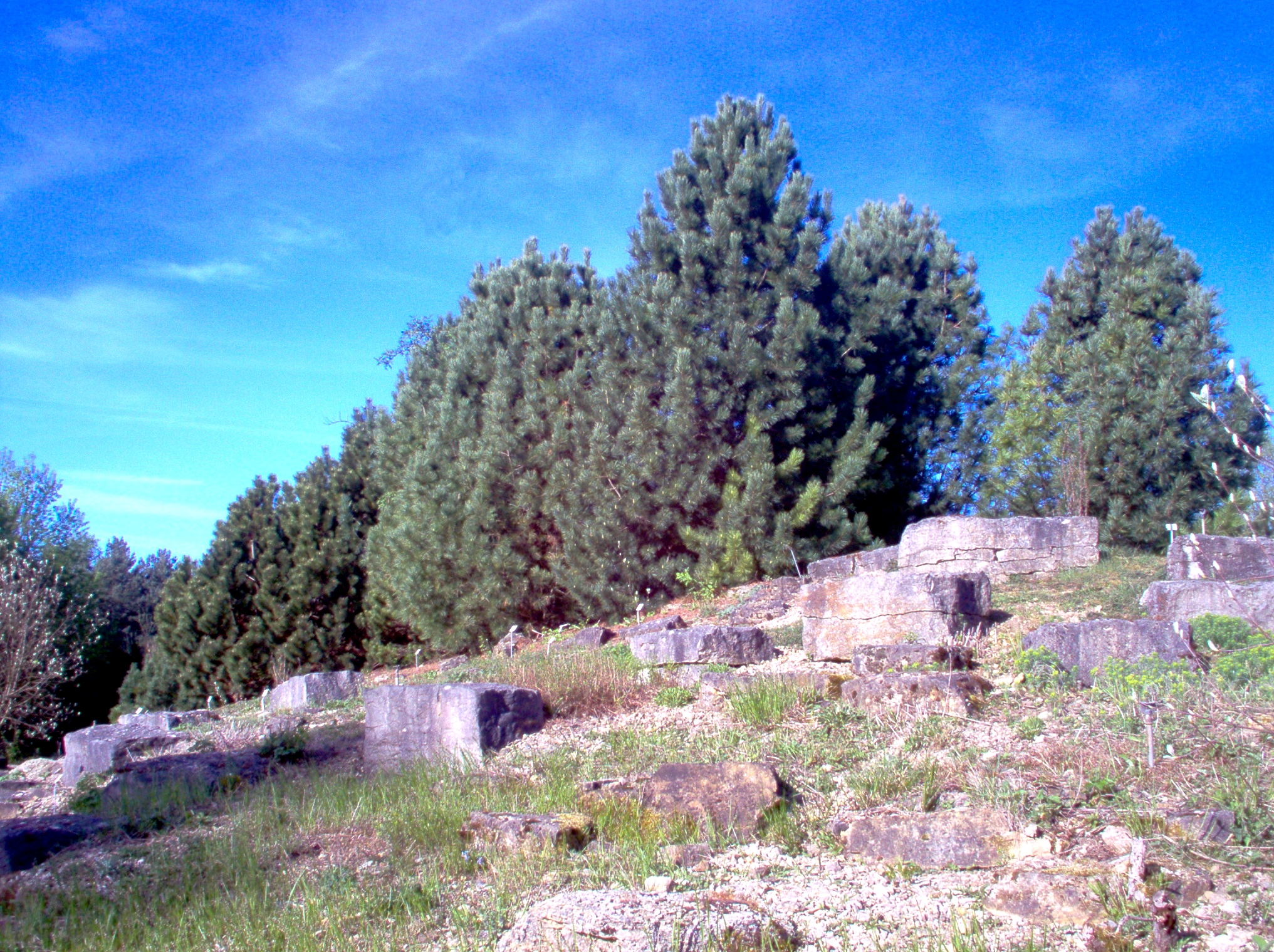 Philipps Universität -Botanischer Garten